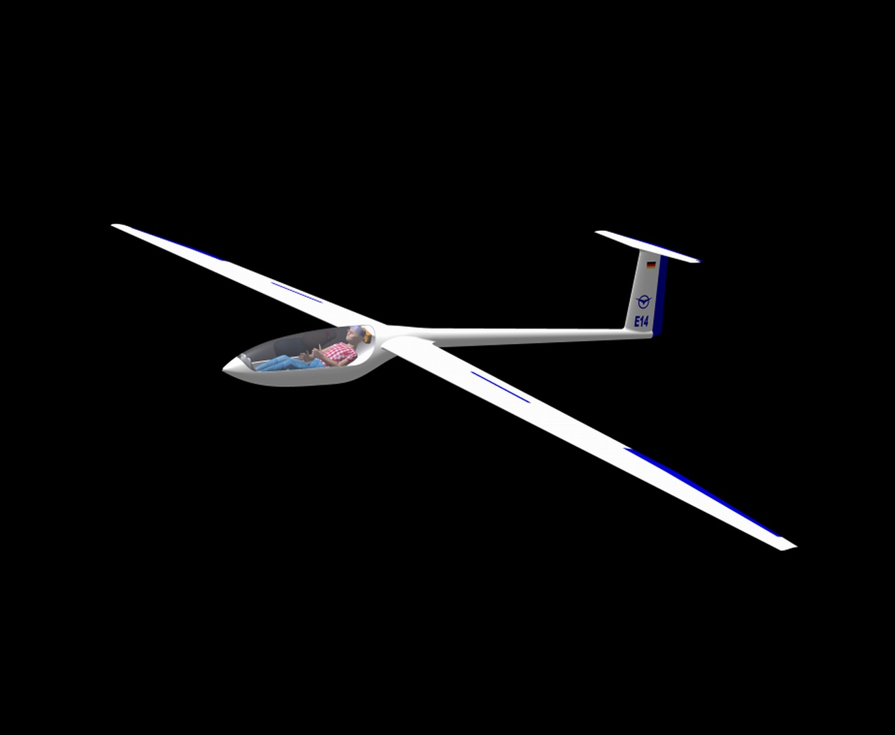 CAD Modell der E14.